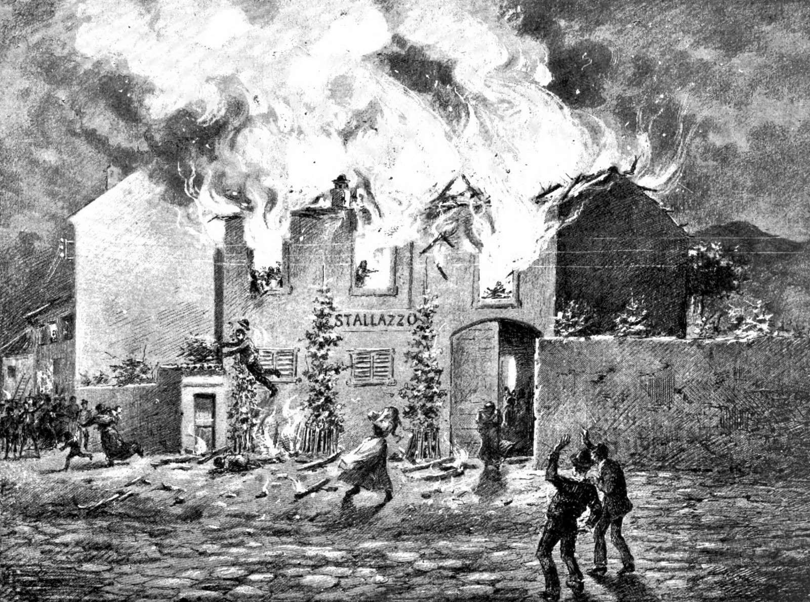 Il disastro di Dervio